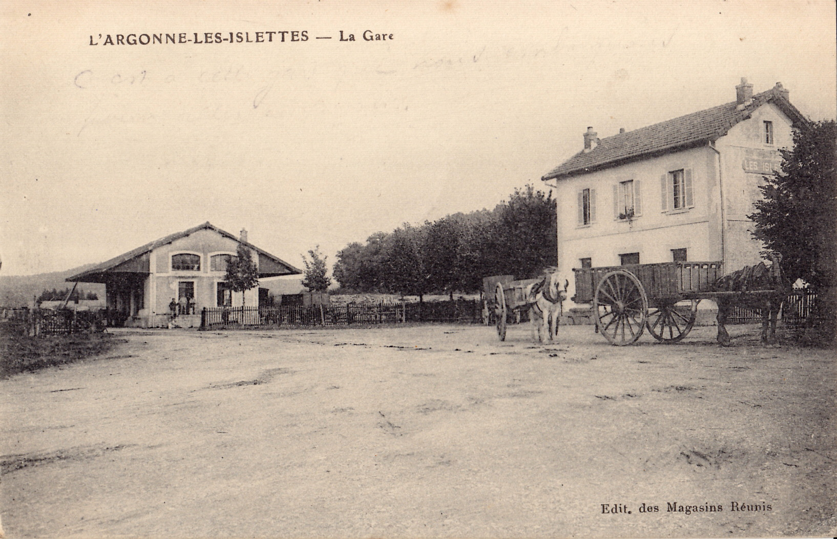 Carte postale ancienne éditée par les Magasins Réunis :L'ARGONNE-LES-ISLETTES - La gare